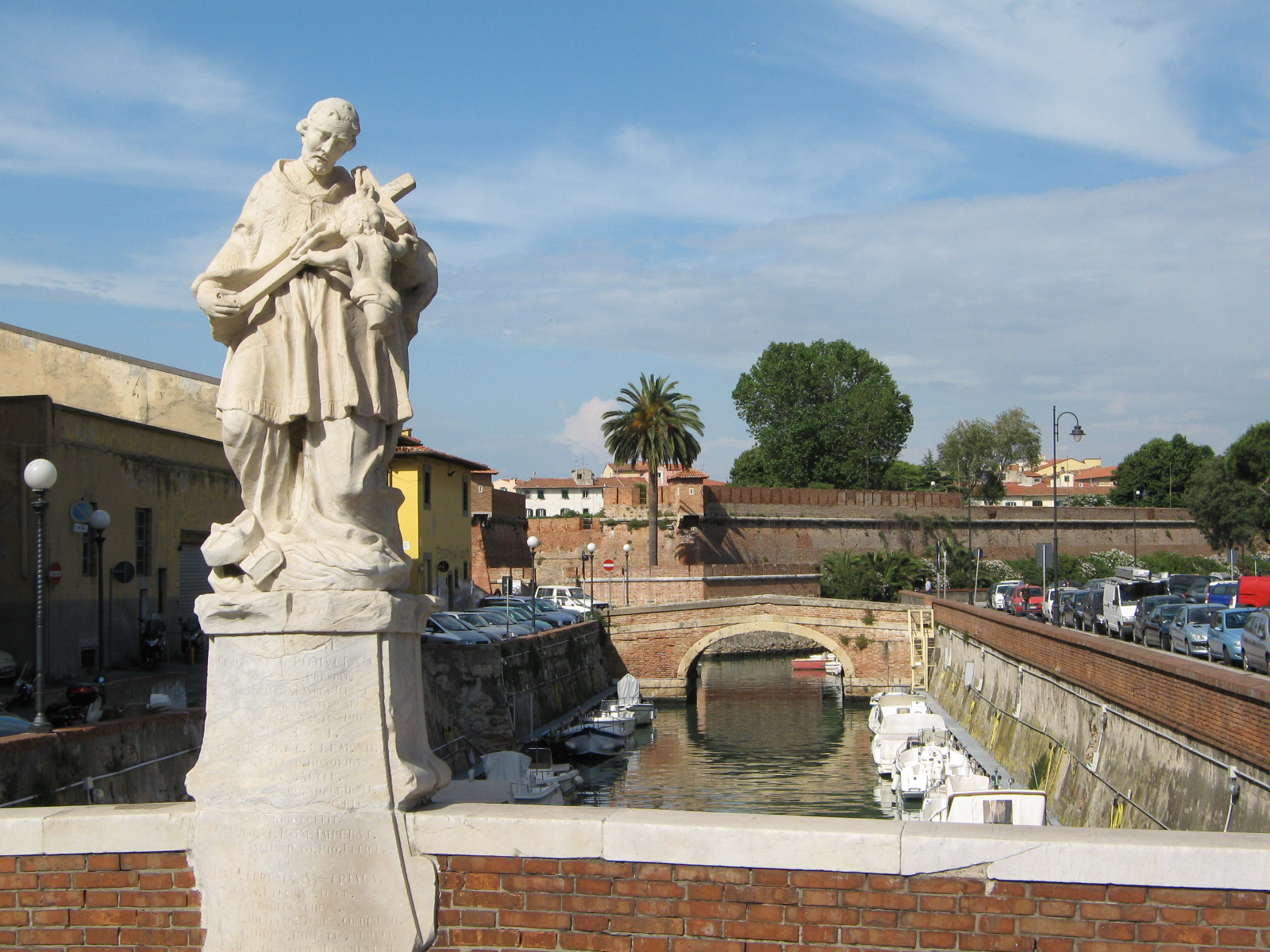 Livorno: la statua San Giovanni Nepomuceno (XVIII secolo) e sullo sfondo la Fortezza Nuova (1590).